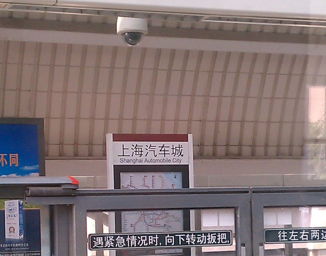 11号线上海汽车城站站台